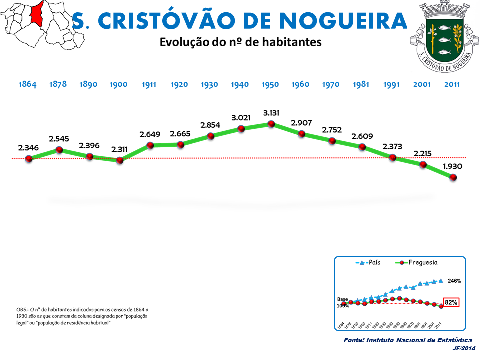 Evolução da População 1864 / 2011